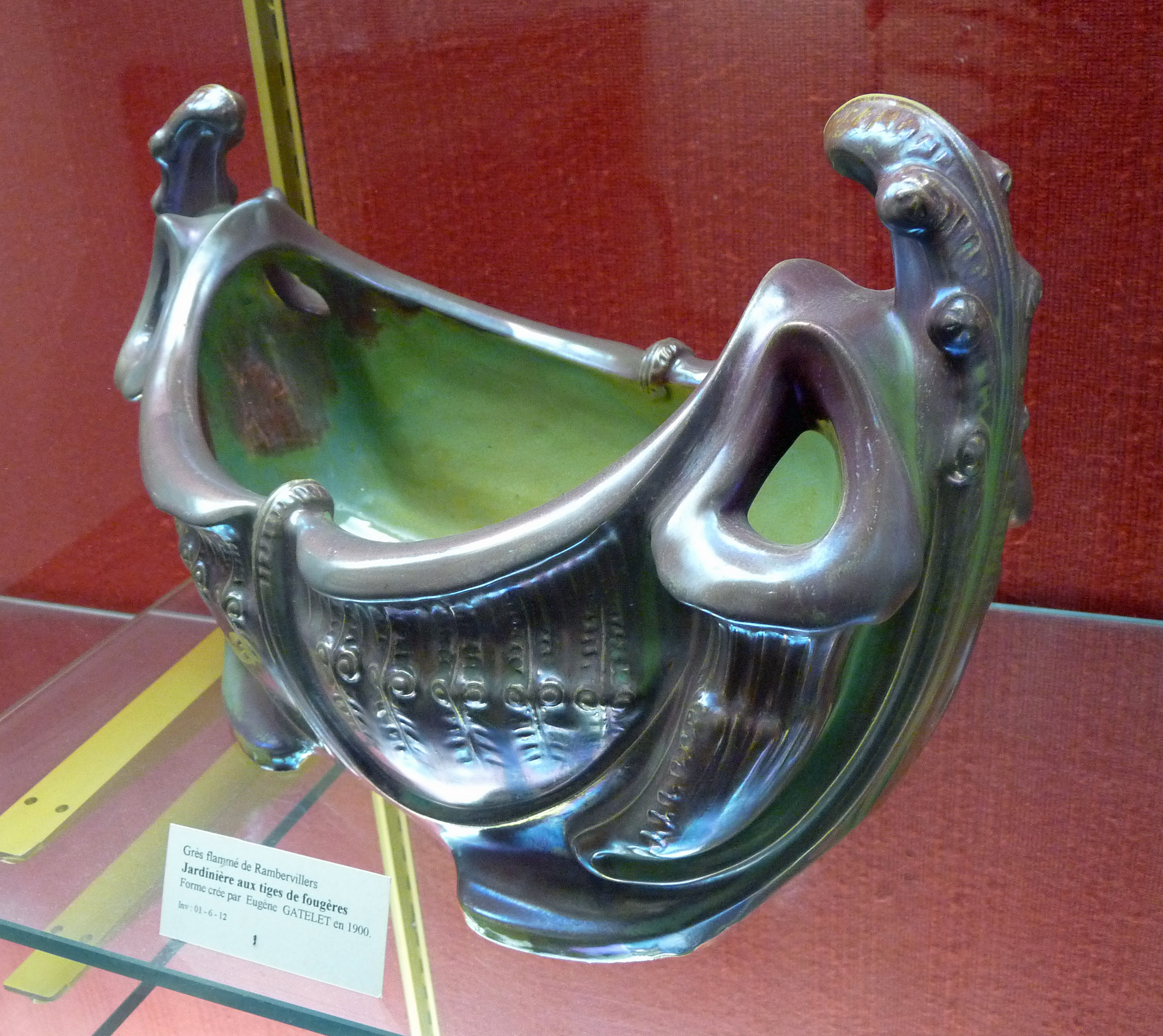 Jardinière aux tiges de fougères, grès flammé de Rambervillers, forme créée en 1900 par Eugène Gatelet (1874-1932)